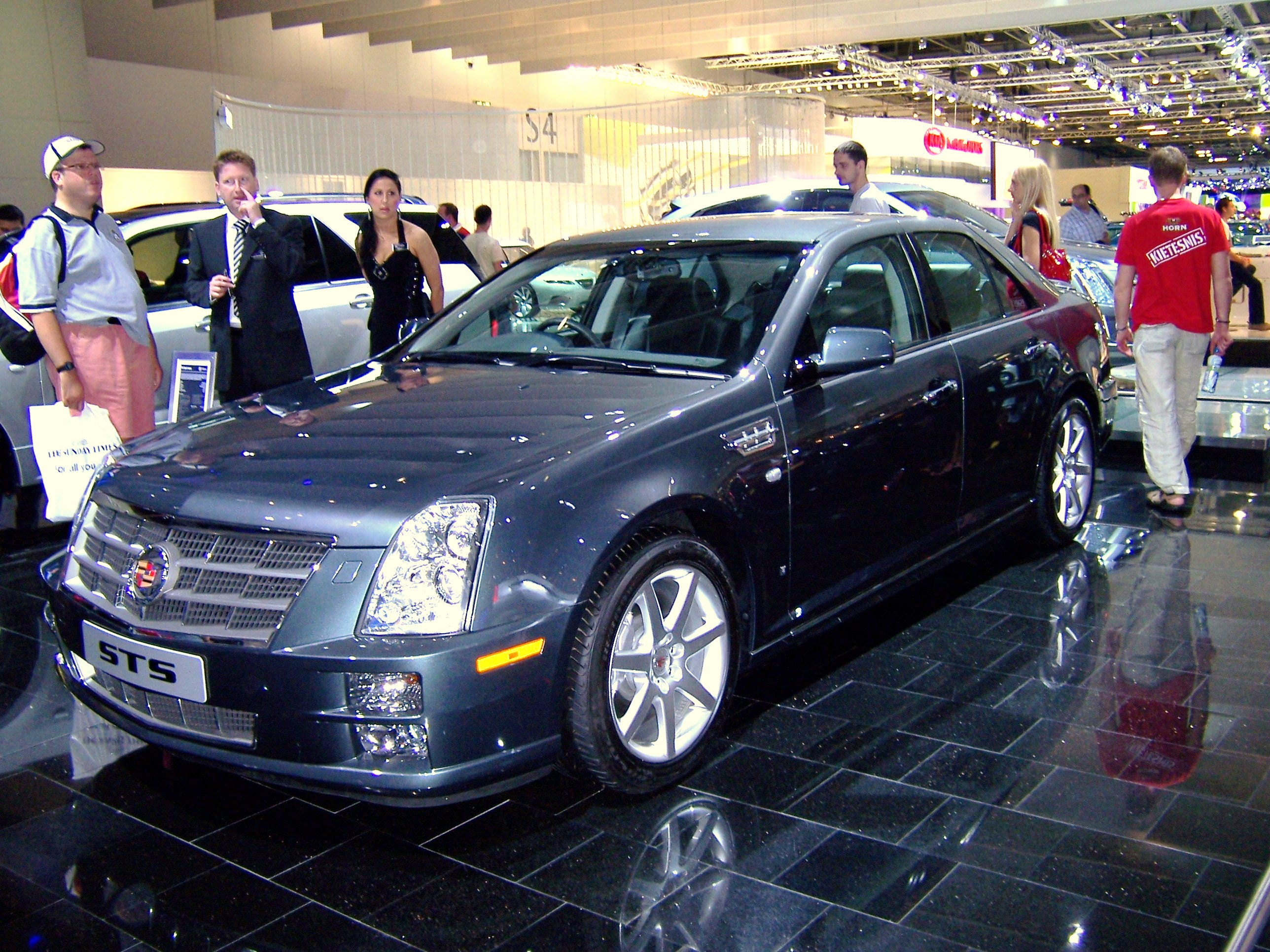 Cadillac STS